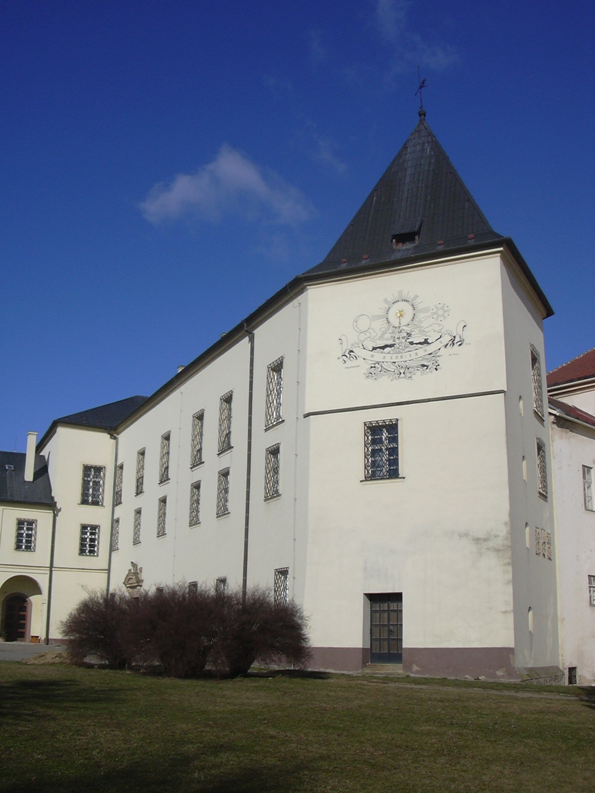 Zámek (Vyškov- czech republic)